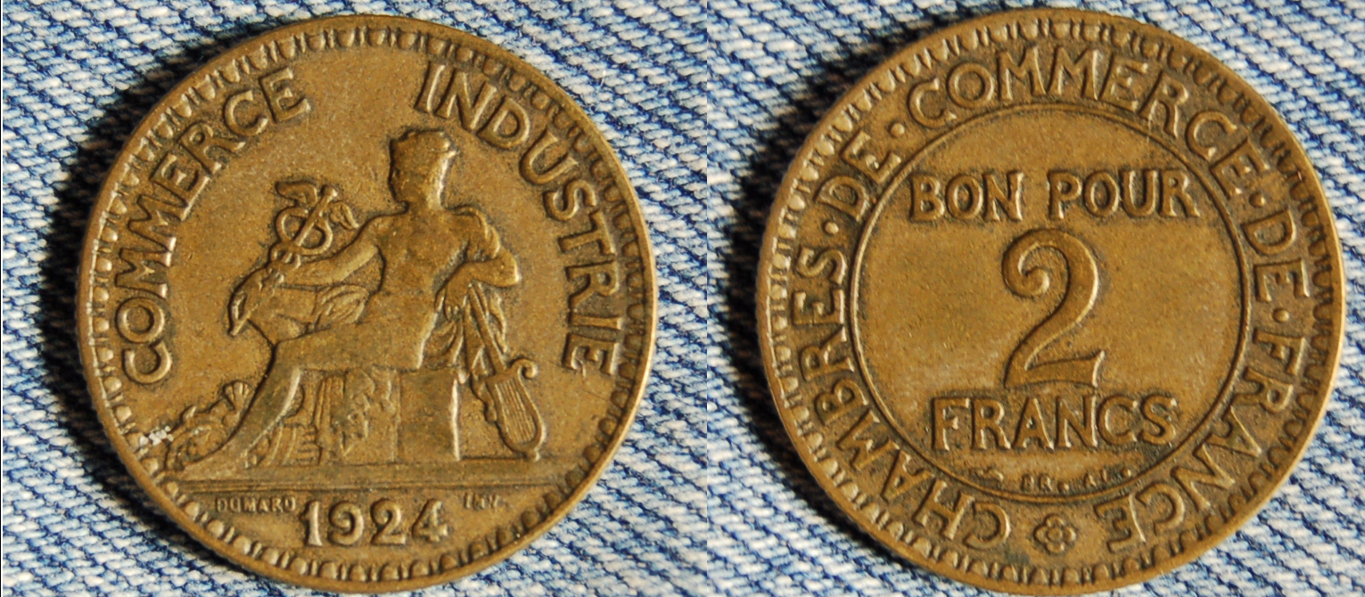 2 francs de 1924 - French coin